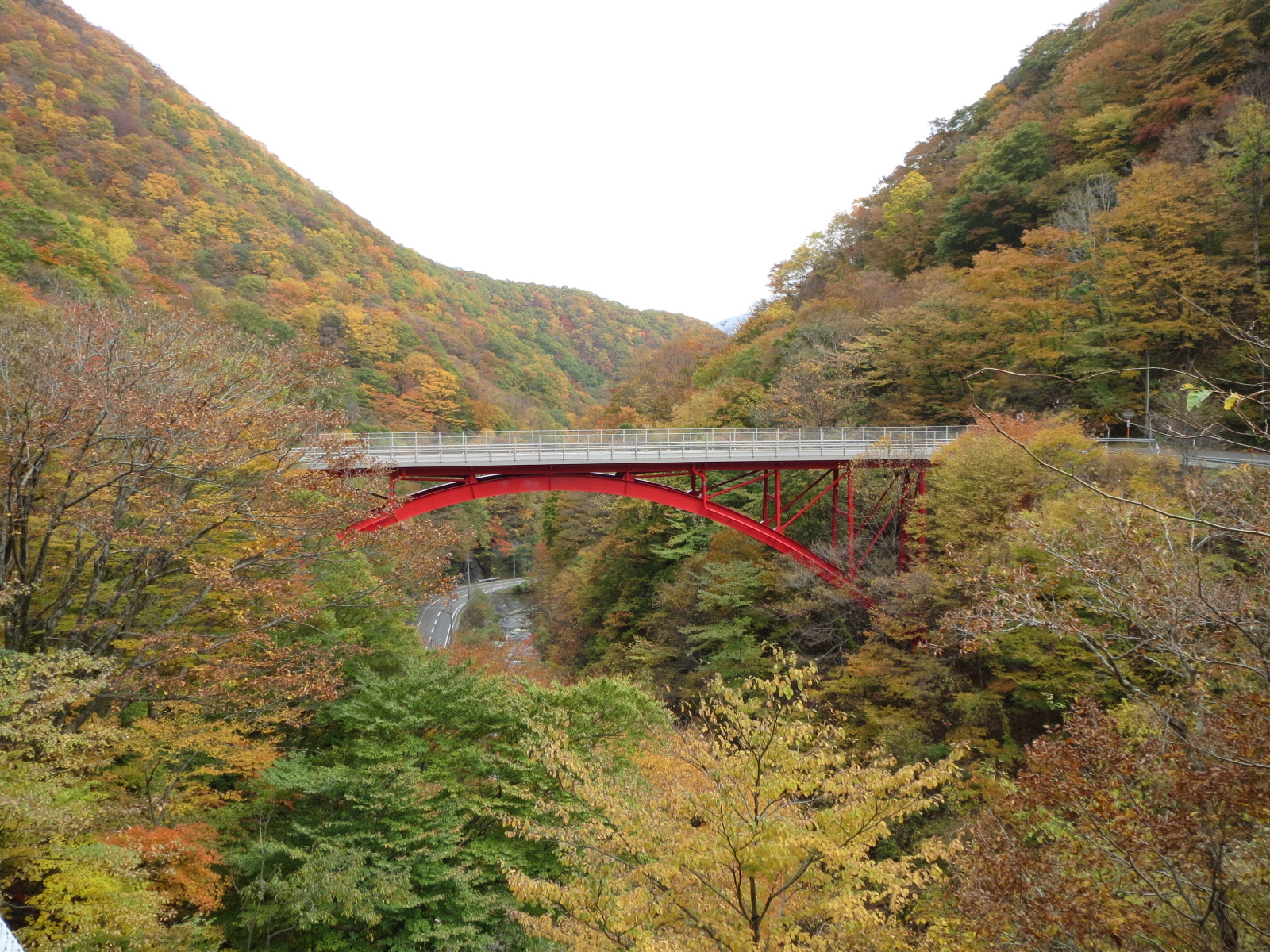 仙人峠で道路を立体交差する仙人大橋